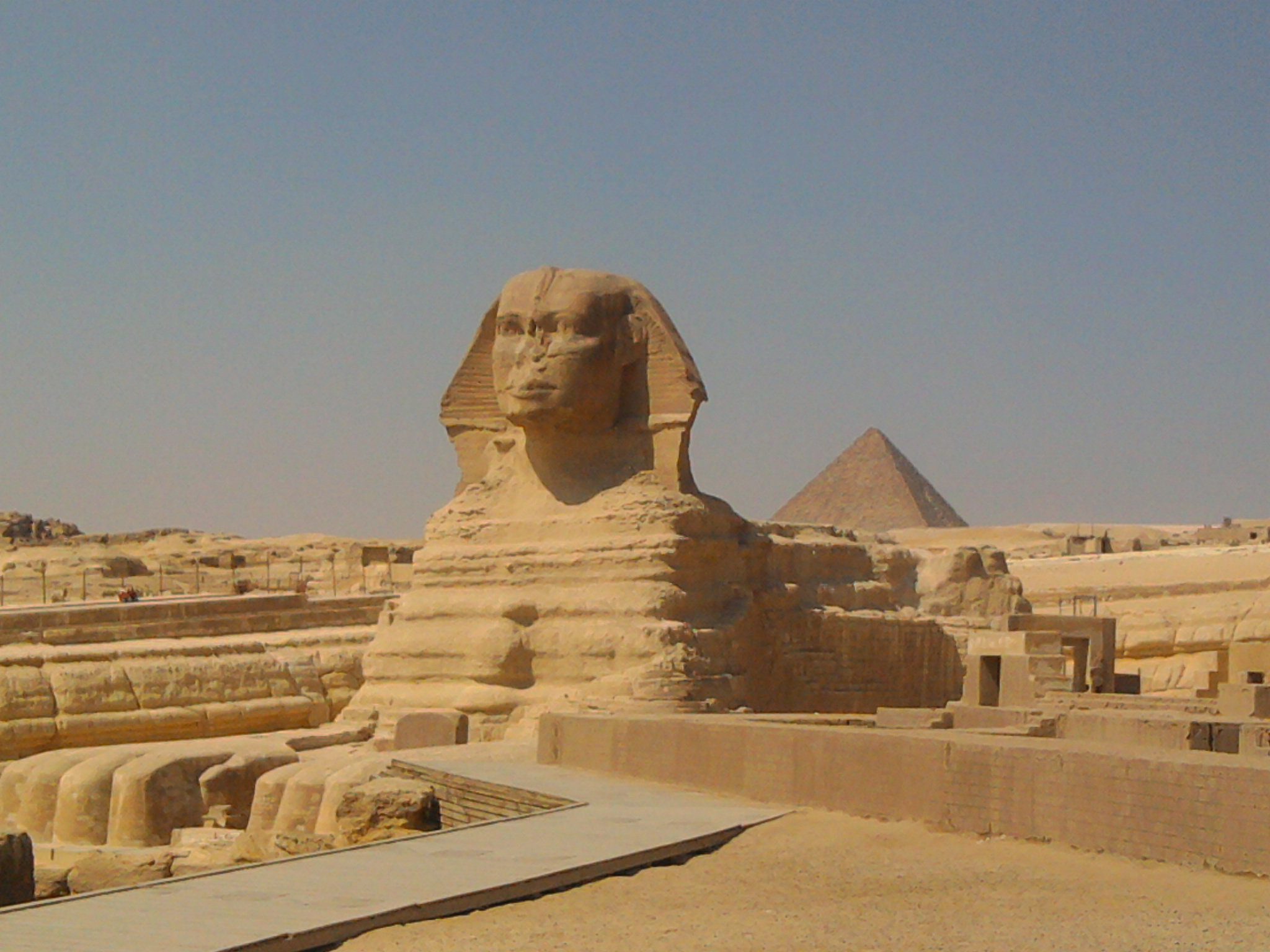 ABO EL HOL